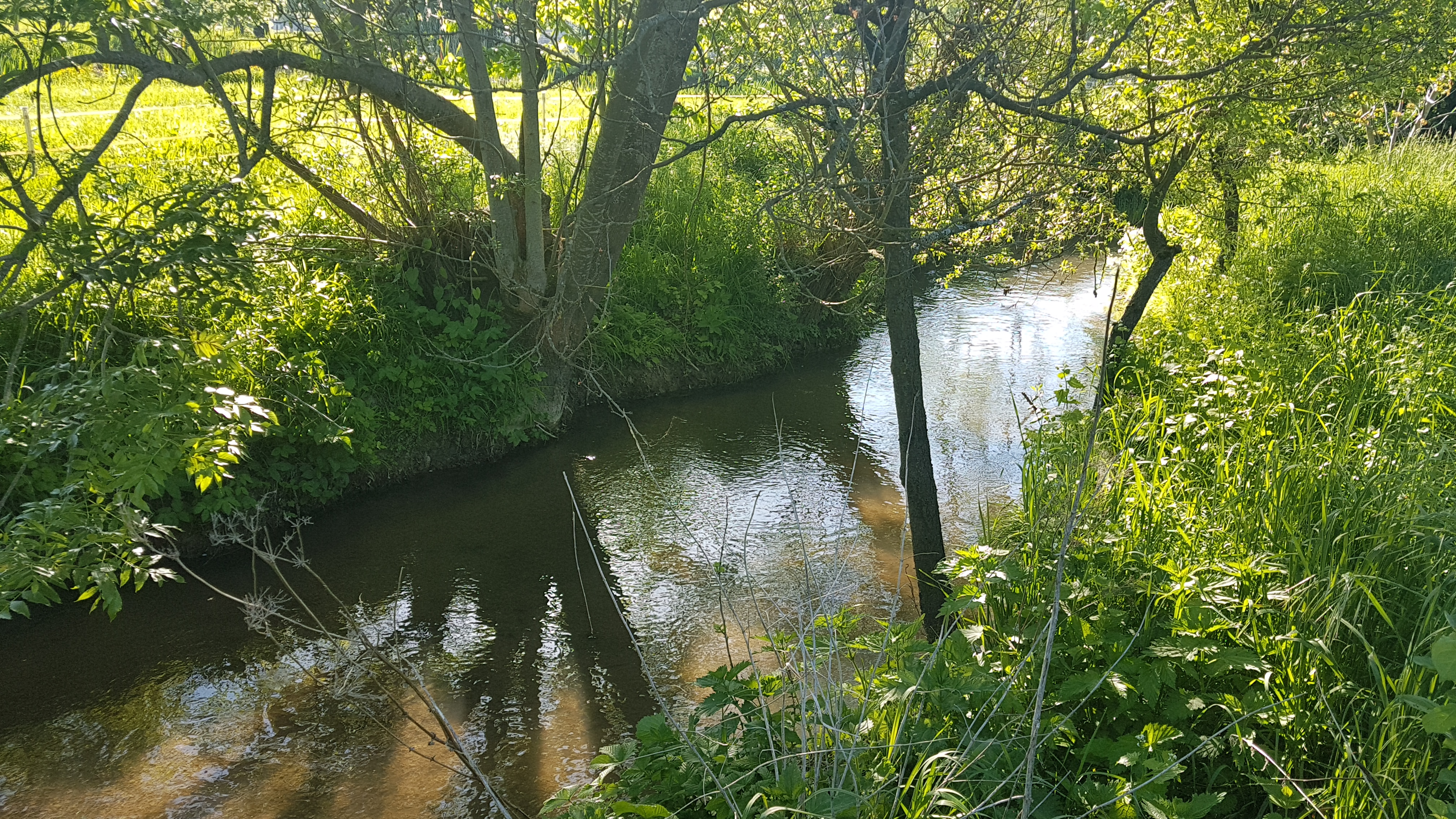 2018-05-07 Die Balbach bei Unterbalbach kurz vor ihrer Mündung in die Tauber